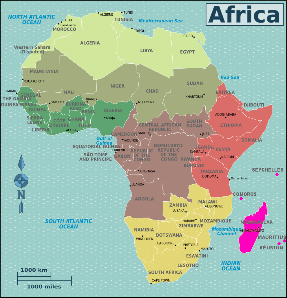 Africa